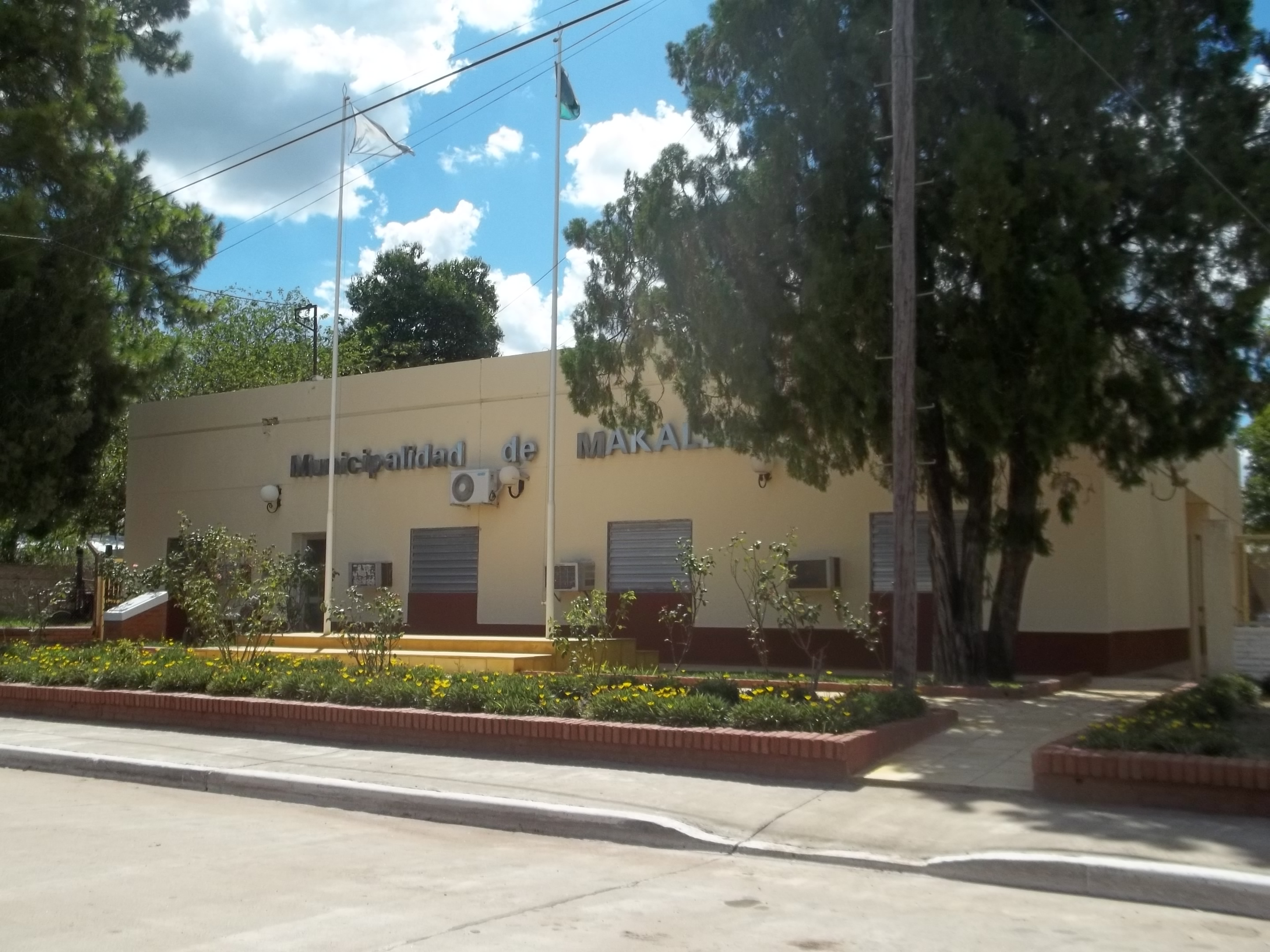 Sede de la municipalidad de Makallé.